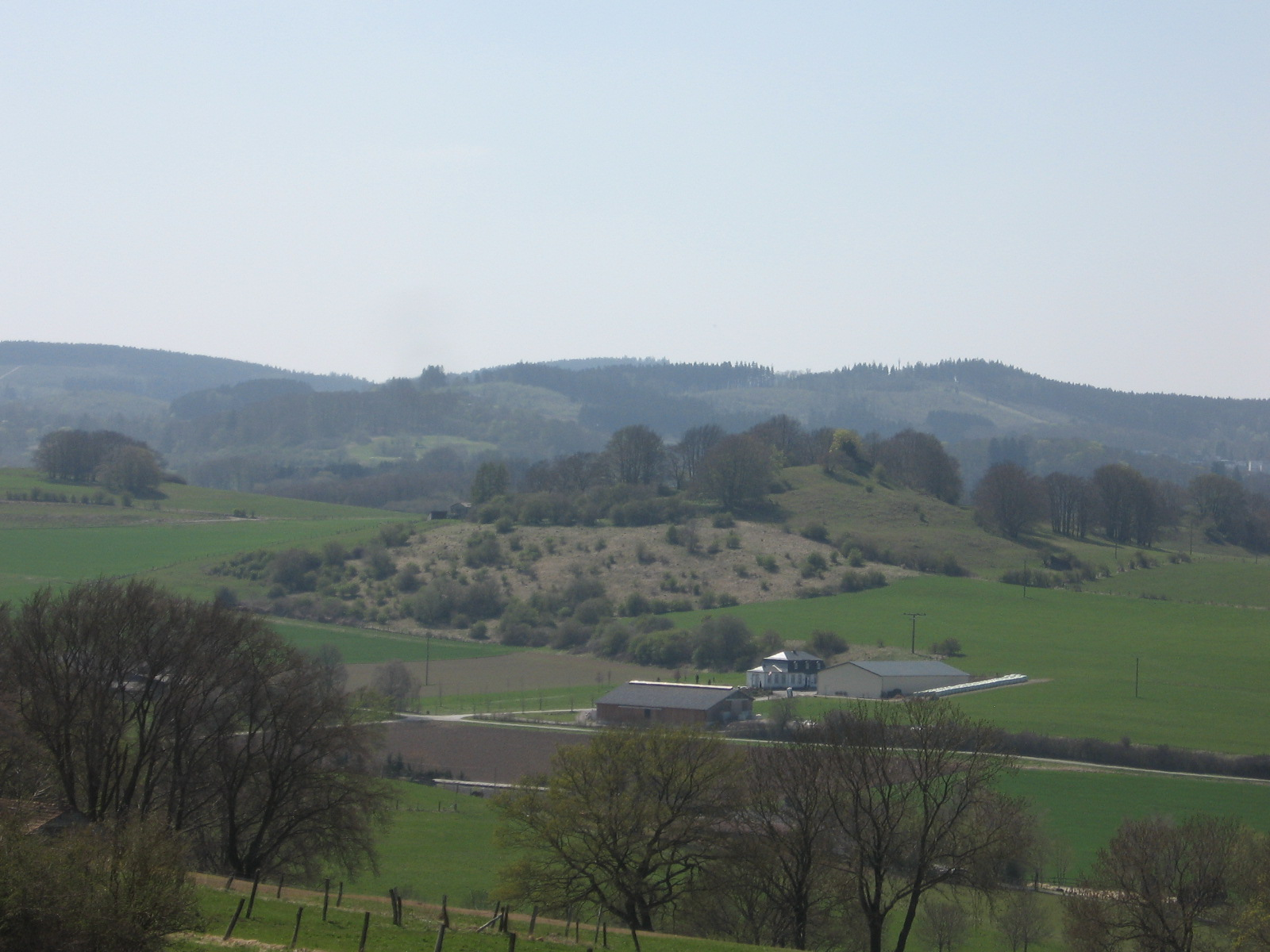 Naturschutzgebiet Scheffelberg/Kalberstert (Bergkuppe Großer Scheffelberg oberhalb des Bauernhofs).